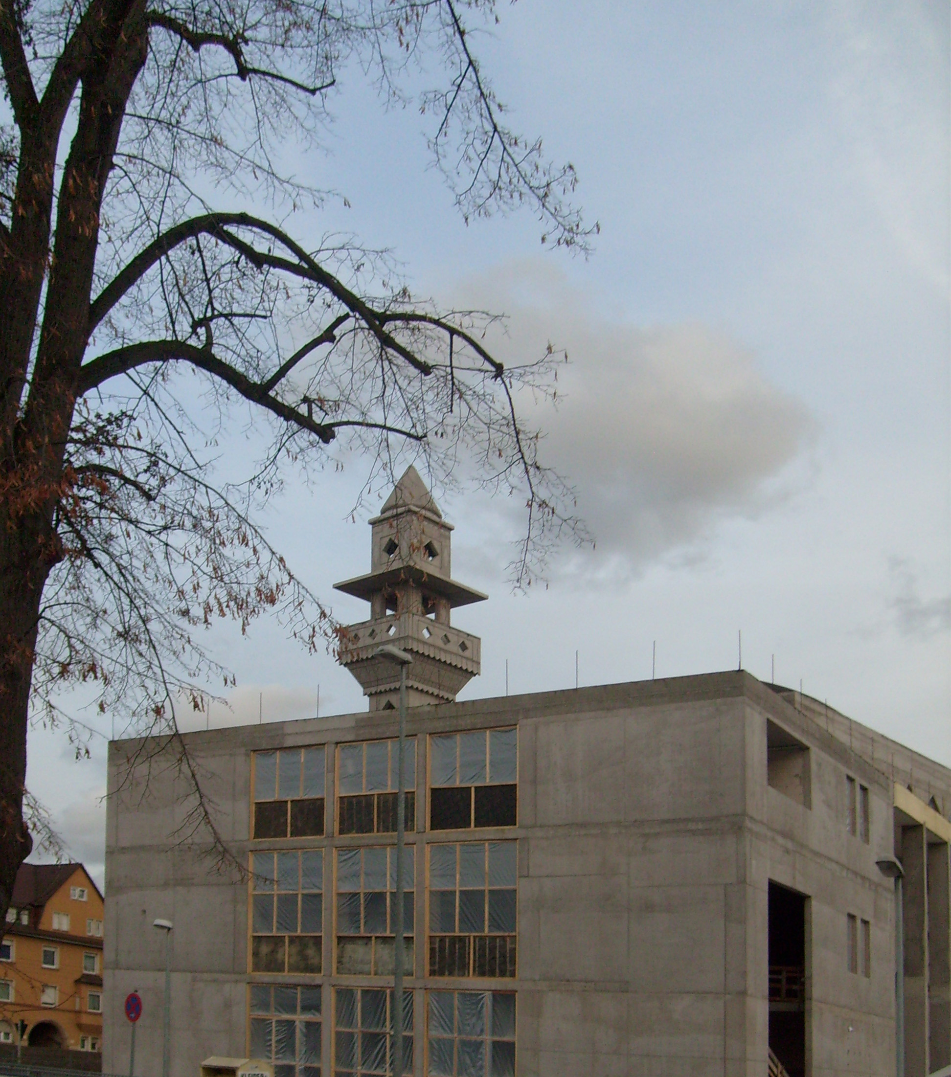 Rohbau der Moschee in Esslingen/Neckar, Ende 2009